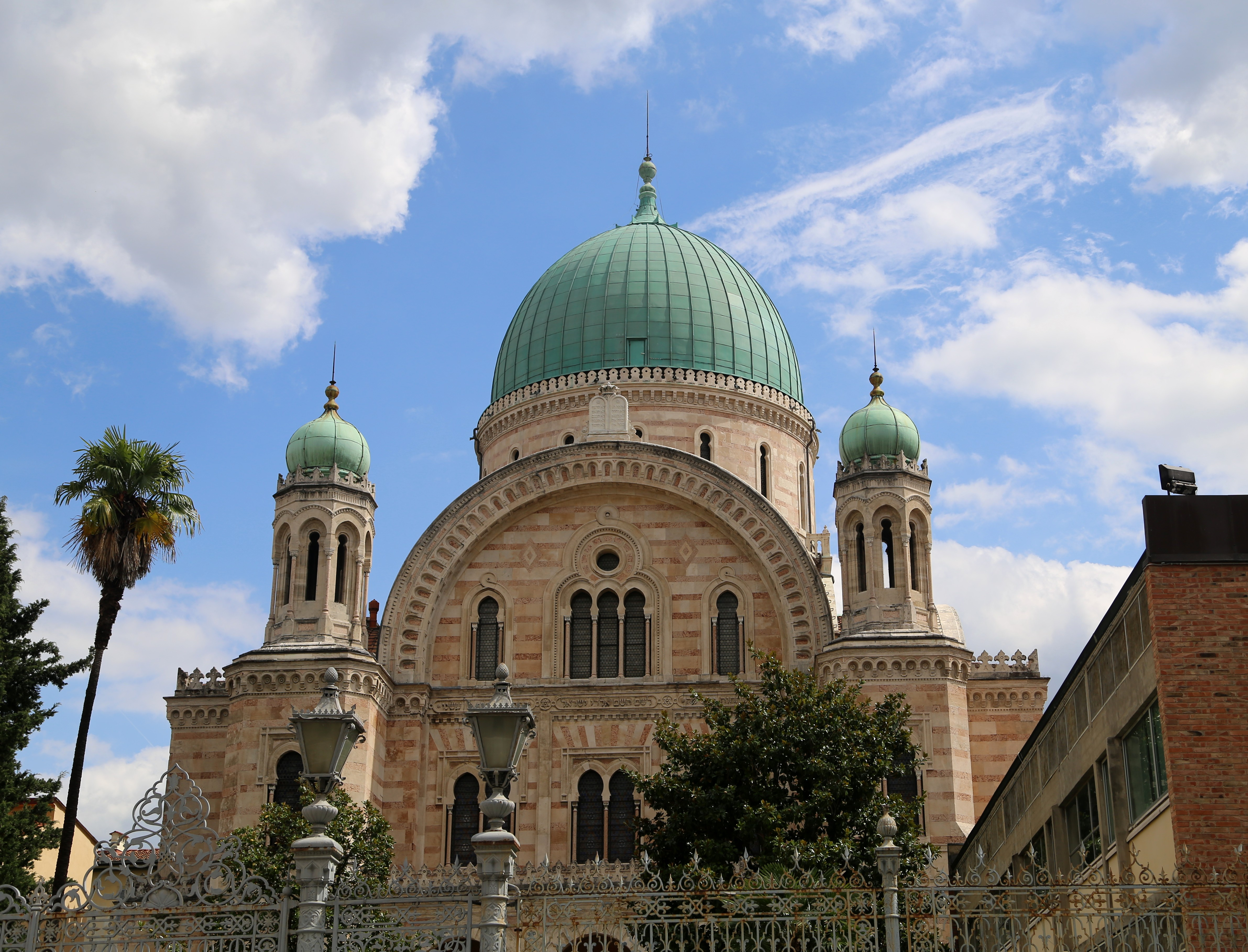 Synagogue, Florenz